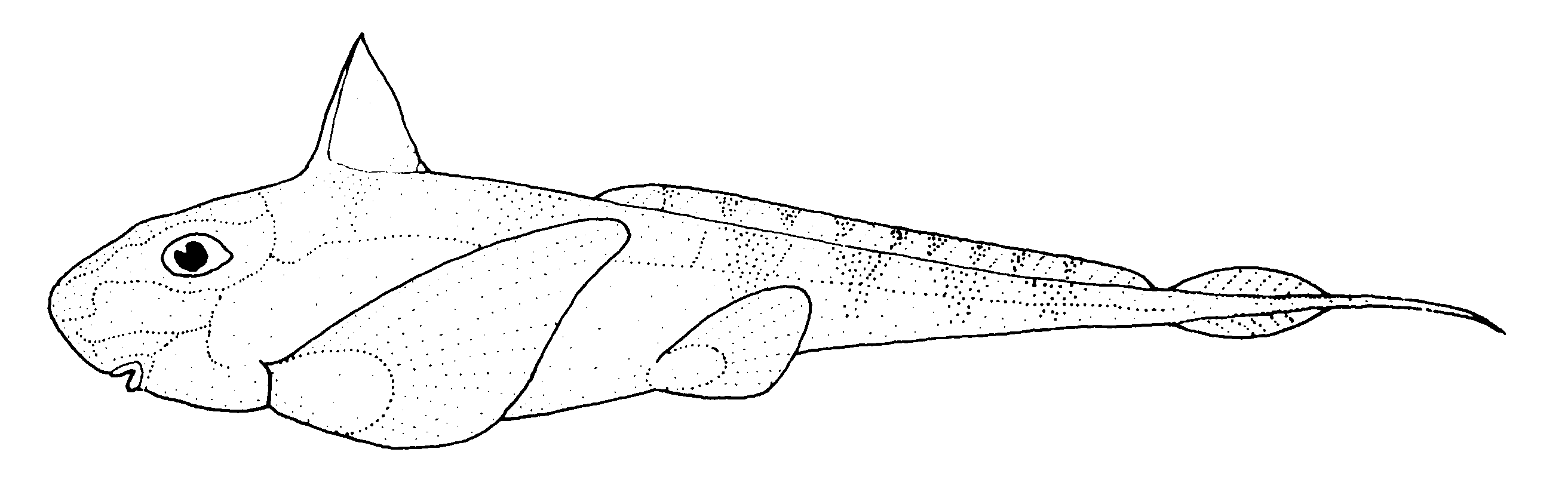 Hydrolagus bemisi (Pale ghost shark)